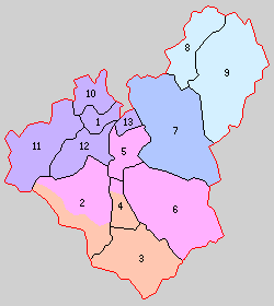 福島県東白川郡の町村。